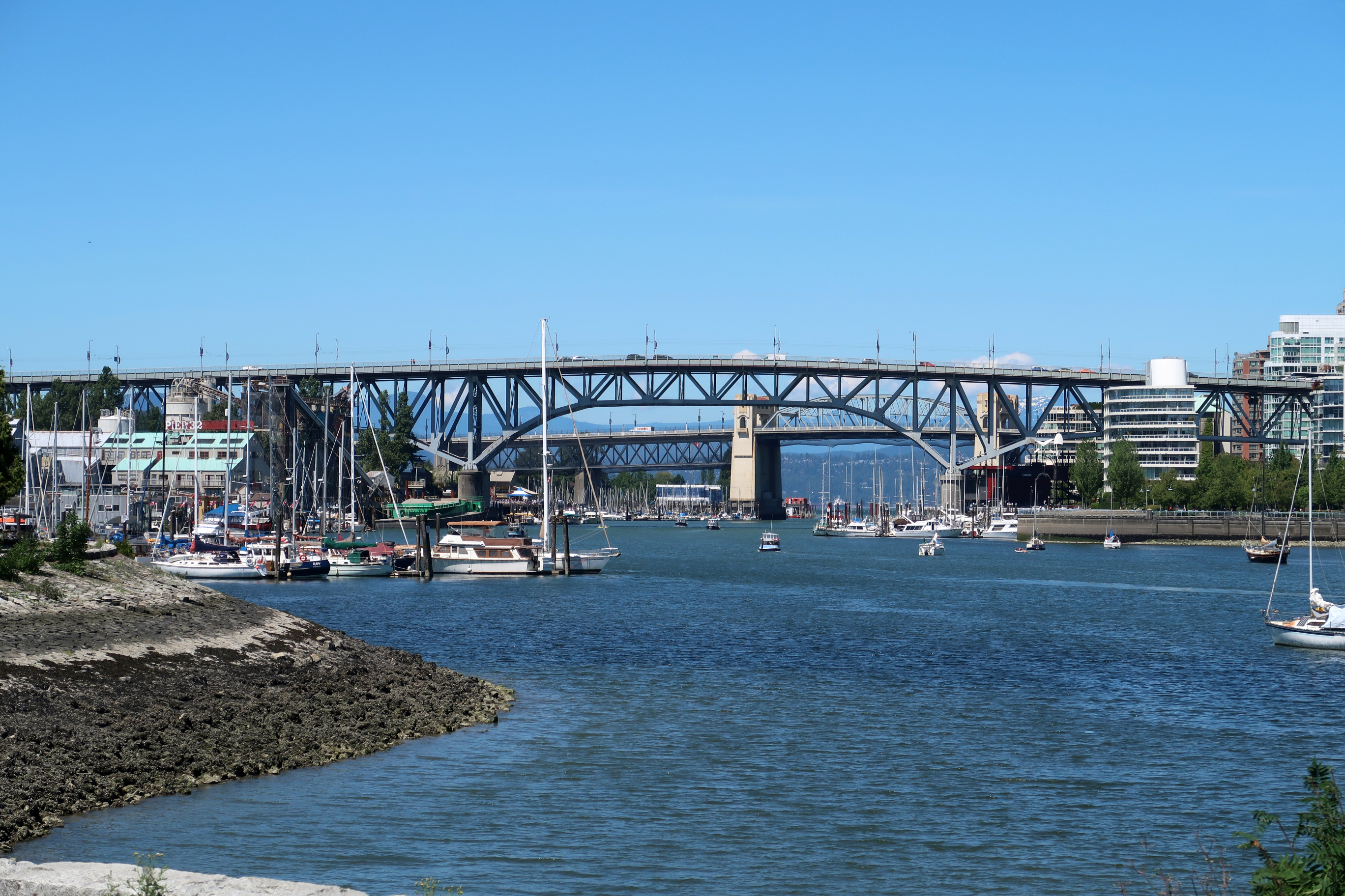 Granville Street Bridge